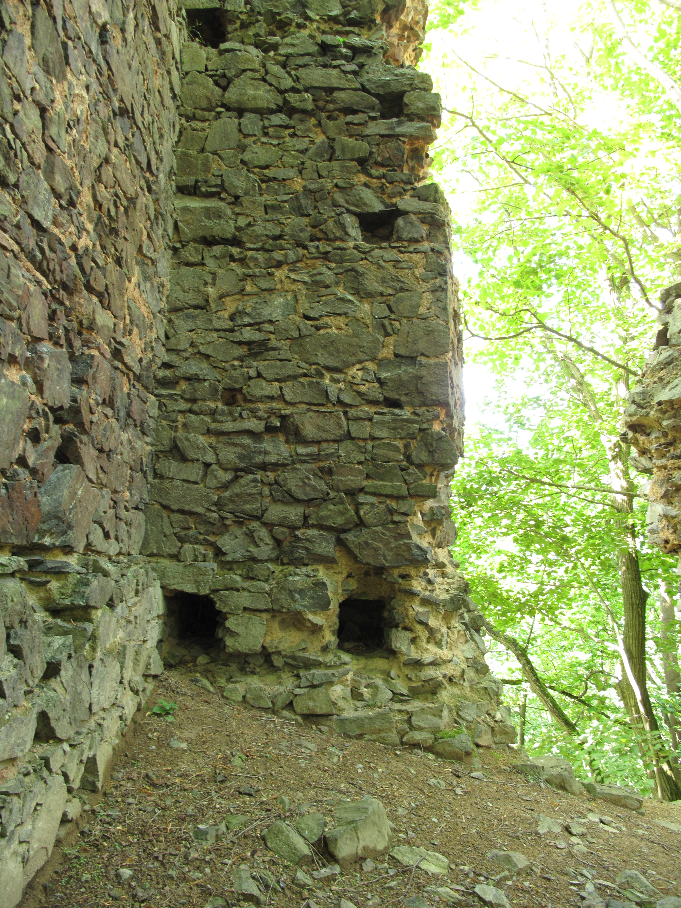 Netřeb – nároží s kapsami po trámech podlahy druhého podlaží a dochovanou špaletou okna